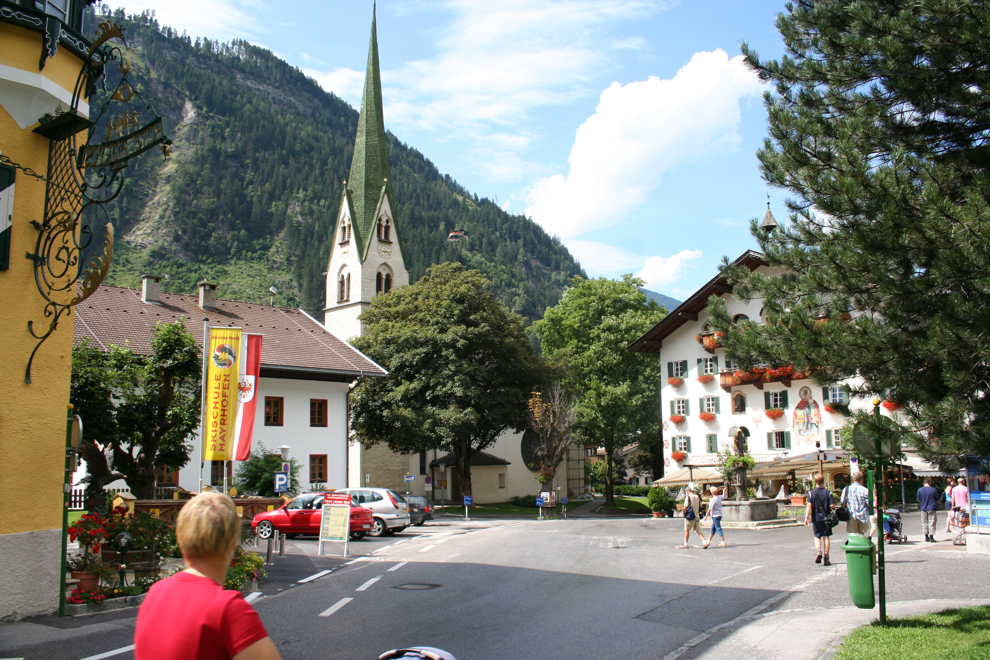 Het centrum van Mayrhofen in het Zillertal in Oostenrijk.